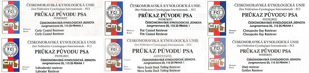 výřezy průkazů původu všech uznaných retrieverů FCI